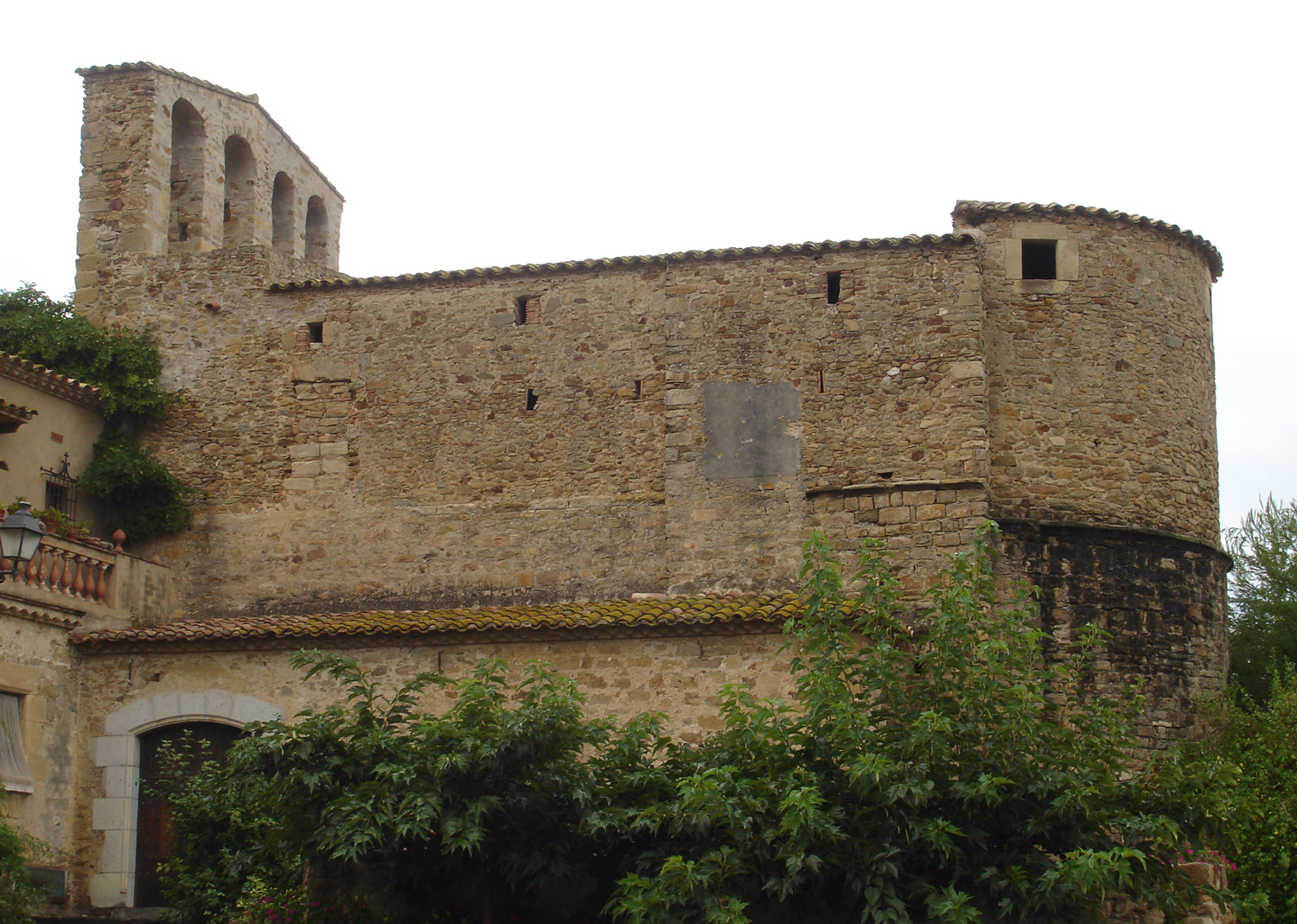 Eglesia de Sant Martí de Fontanilles (Girona, Catalunya, Espanya) - Lateral. Part més accesible i visible